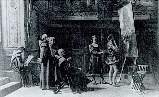 Francesco da Castello besichtigt Rafaels Vermählung Mariens in der Sakristei von S. Francesco